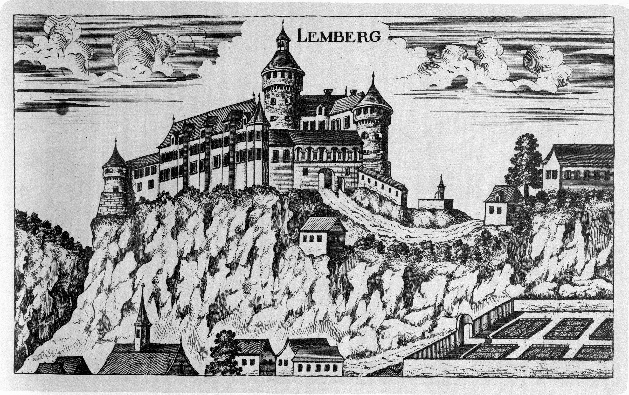 G. M. Vischers Käyserlichen Geographi, Topographia Ducatus Stiriae, Das ist: Eigentliche Delineation / und Abbildung aller Städte / Schlösser / Marcktfleck / Lustgärten / Probsteyen / Stiffter / Clöster und Kirchen / so es sich im Herzogthumb Steyrmarck befinden; Und anjetzo Umb einen billichen Preyß zu finden seynd Bey Johann Bitsch Universitäts Buchhandlern / Auff dem Juden=Platz bey der guldenen Saulen. Graz 1681 Die Nummerierung der Dateien folgt der alphabetischen Reihung der Ortsnamen